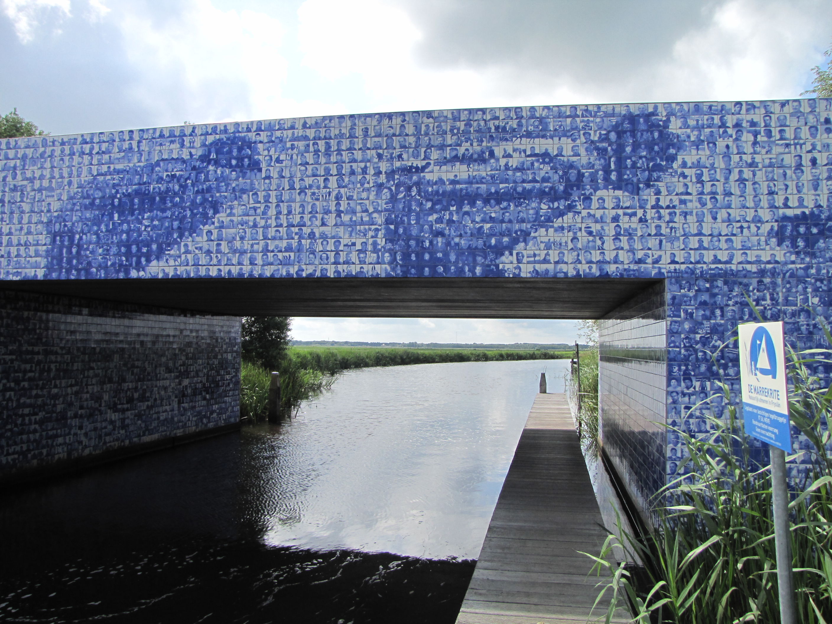 Denkmal für die Elf-Städte-Tour in Friesland, gelegen bei Giekerk (Gemeinde Tietjerksteradeel). Das Denkmal ist eine Brücke, die mit blau-weißen Kacheln bedeckt ist. Von weitem sieht man Schlittschuhläufer, von nahem erkennt man, dass die Kacheln jeweils einen Schliffschuhläufer abbilden, der historisch an einer Elf-Städte-Tour teilgenommen hat.